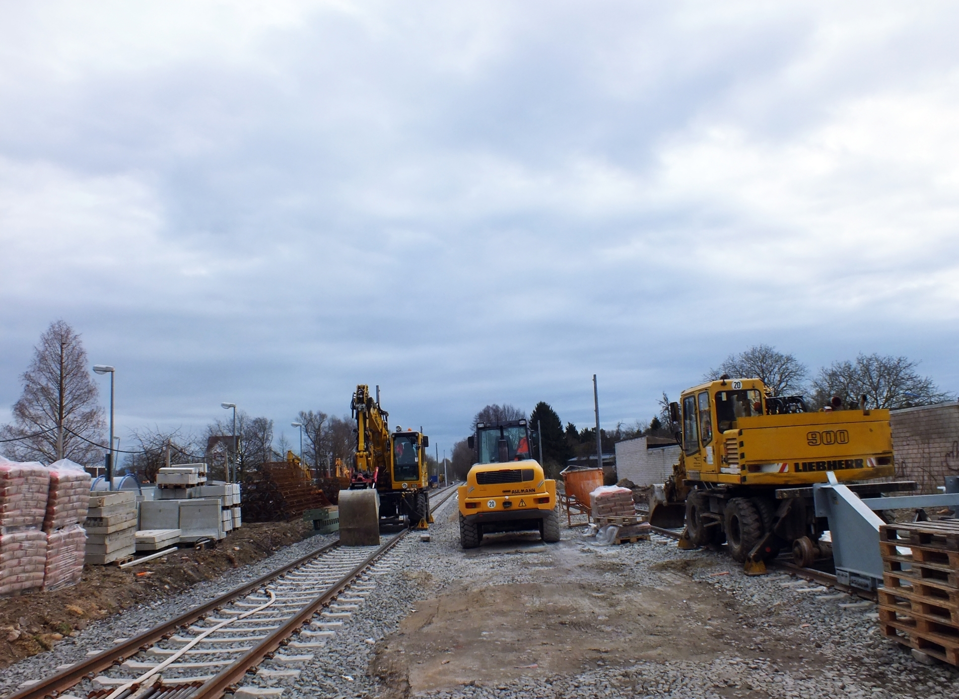 Bauarbeiten im Bahnhofsbereich.